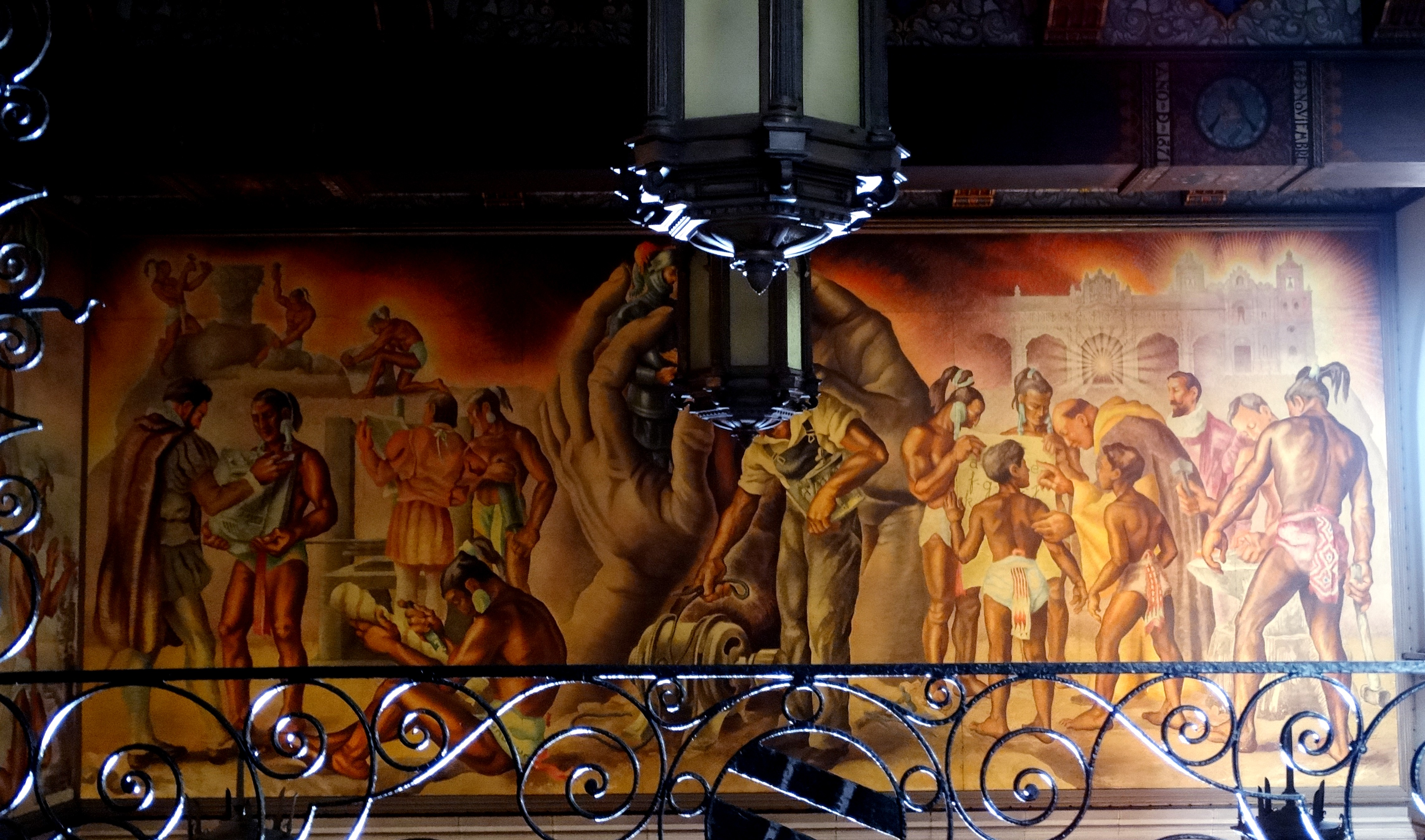 Guatemala - Guatemala City, Centro Historico de Guatemala Palacio Nacional